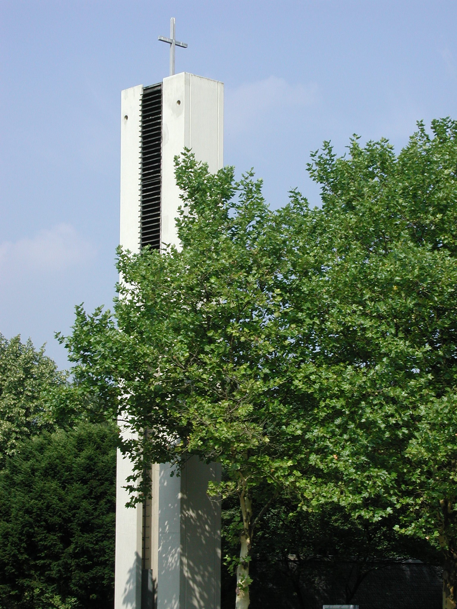 E. Kirche im Gemeindezentrum Klausen